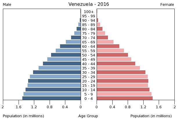 A population pyramid illustrates the age and sex structure of a country's population and may provide insights about political and social stability, as well as economic development. The population is distributed along the horizontal axis, with males shown on the left and females on the right. The male and female populations are broken down into 5-year age groups represented as horizontal bars along the vertical axis, with the youngest age groups at the bottom and the oldest at the top. The shape of the population pyramid gradually evolves over time based on fertility, mortality, and international migration trends.